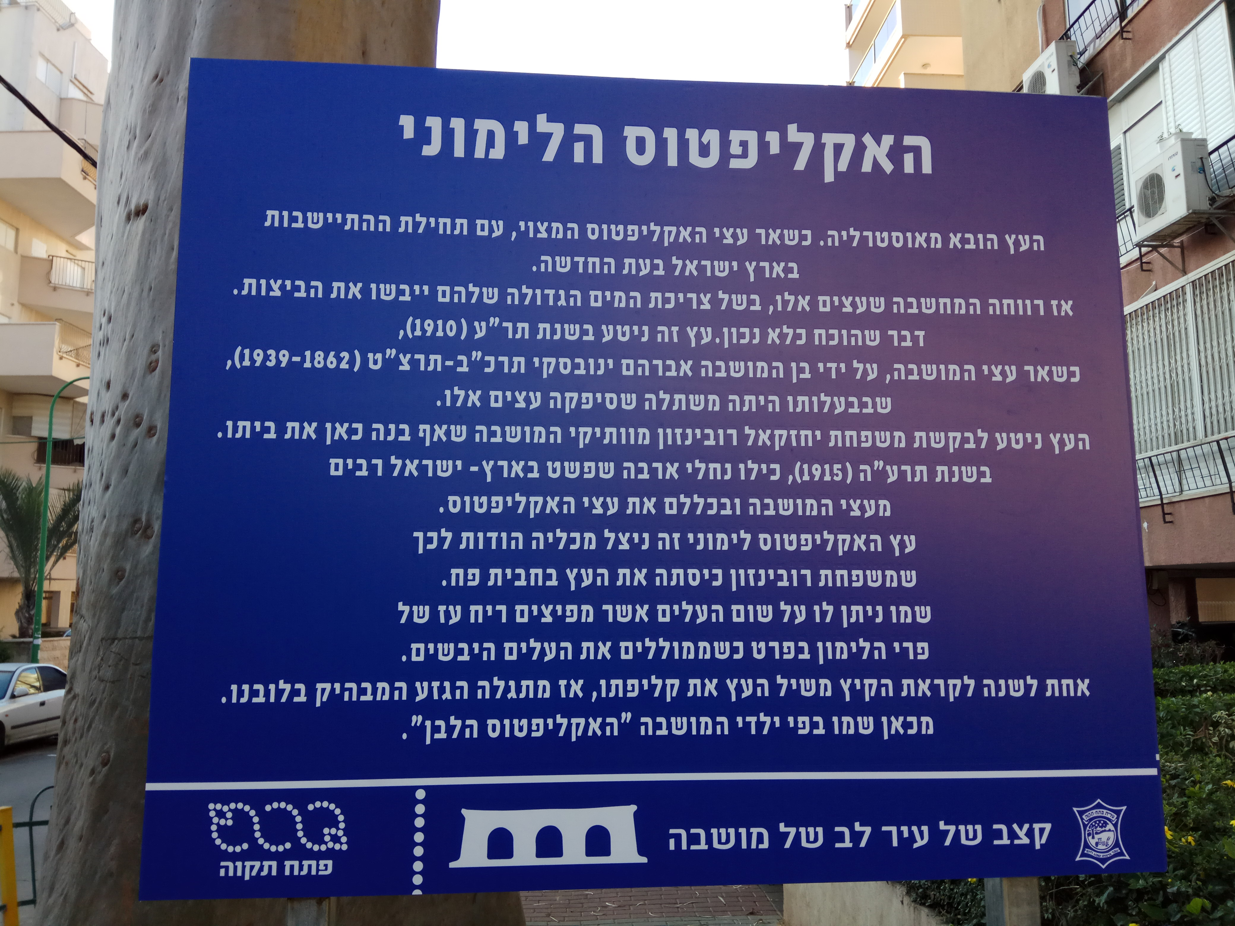 שלט הסבר על האקליפטוס הלימוני ברחוב שפירא בפתח תקווה